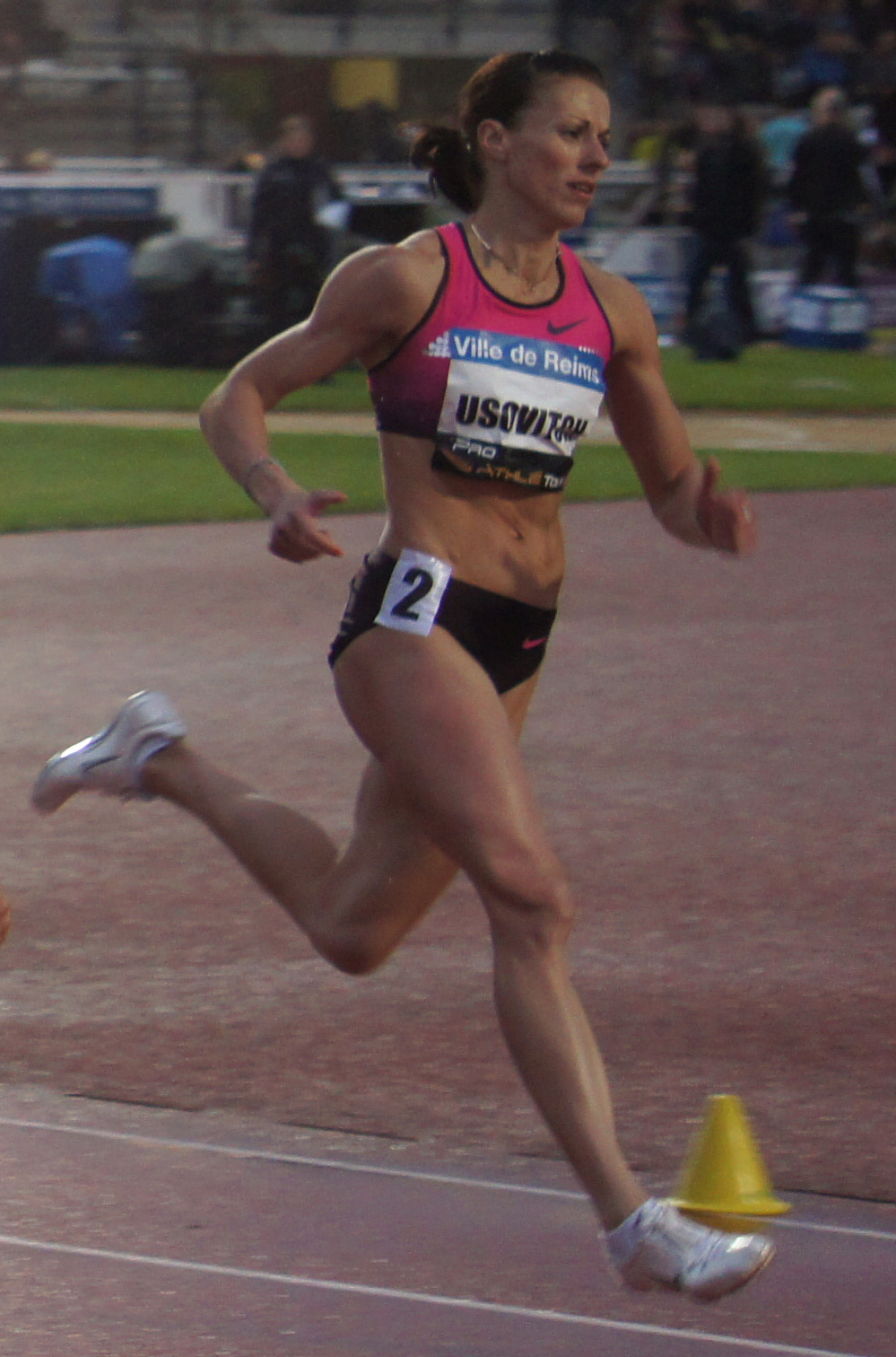 Ilona Usovich lors des Rencontres d'athlétisme de Reims 2013.